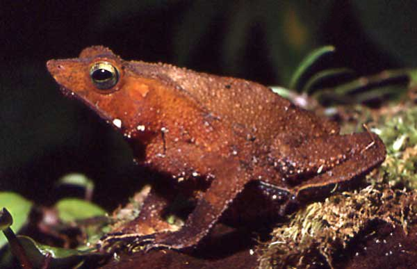 Bufo proboscideus